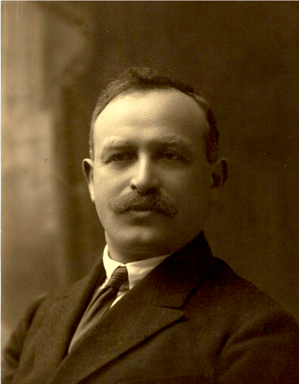 המו"ל שלמה שׂרֶבֶּרק (שרעבערק; 1876–1944)